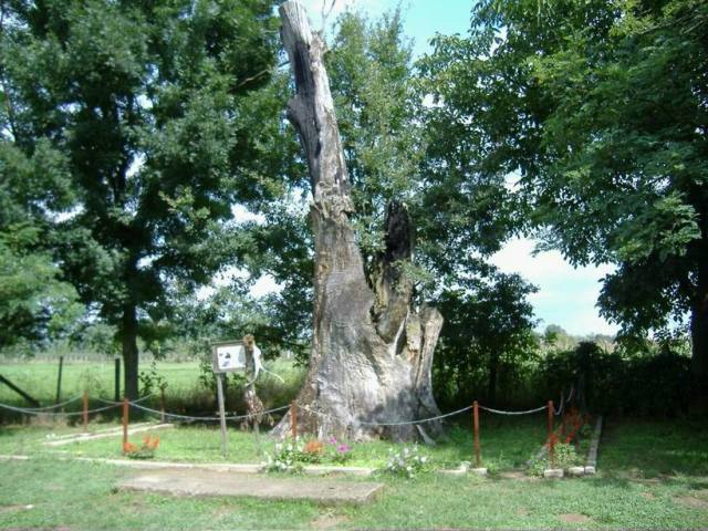 Nagyar, ami a Petőfi-fából megmaradt (Szabolcs-Szatmár-Bereg megye)